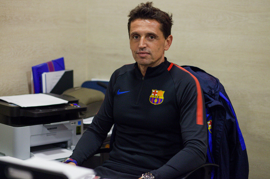 Jordi Gratacós en su despacho